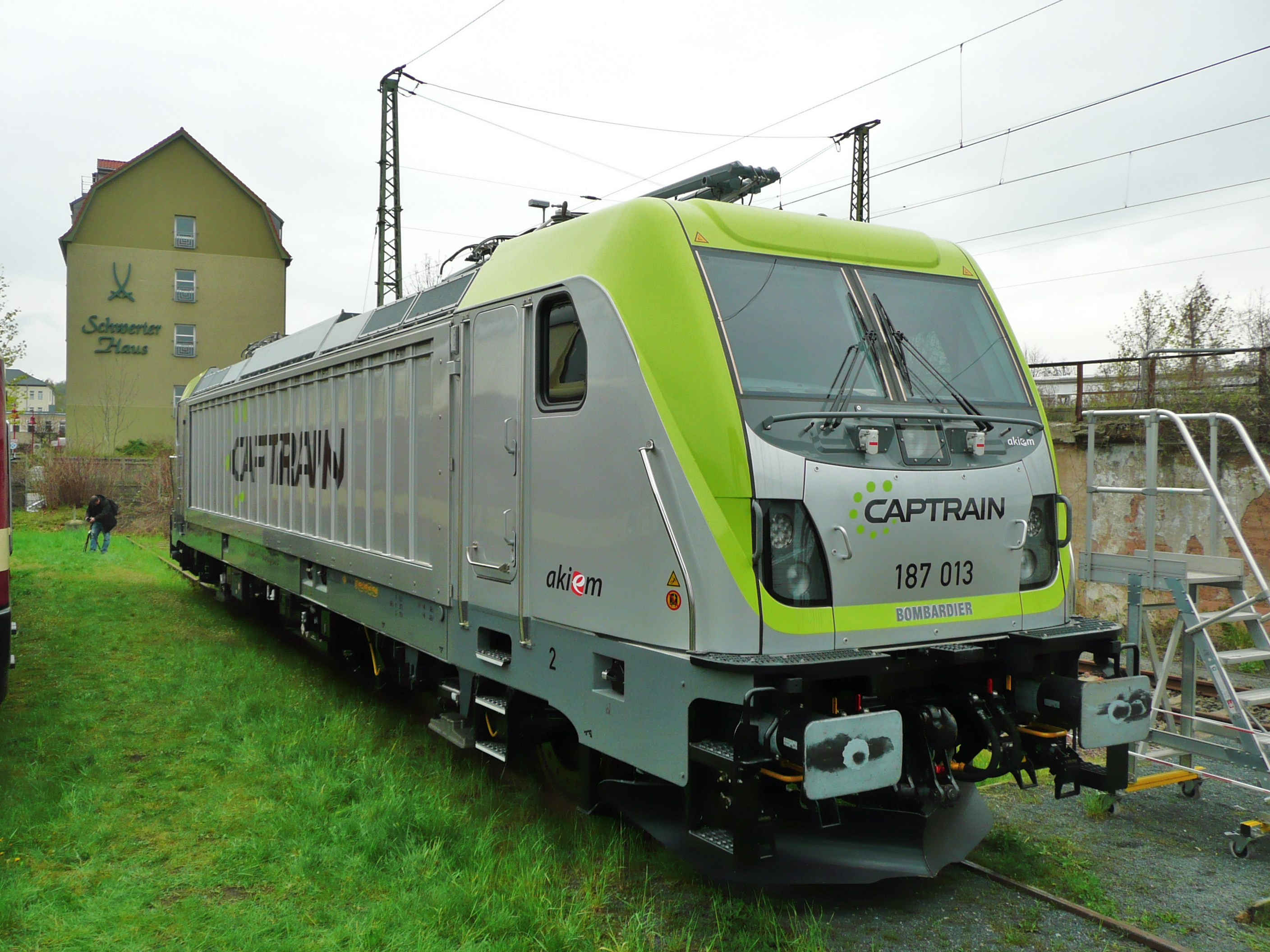 187 013 beim Dampflokfest Dresden